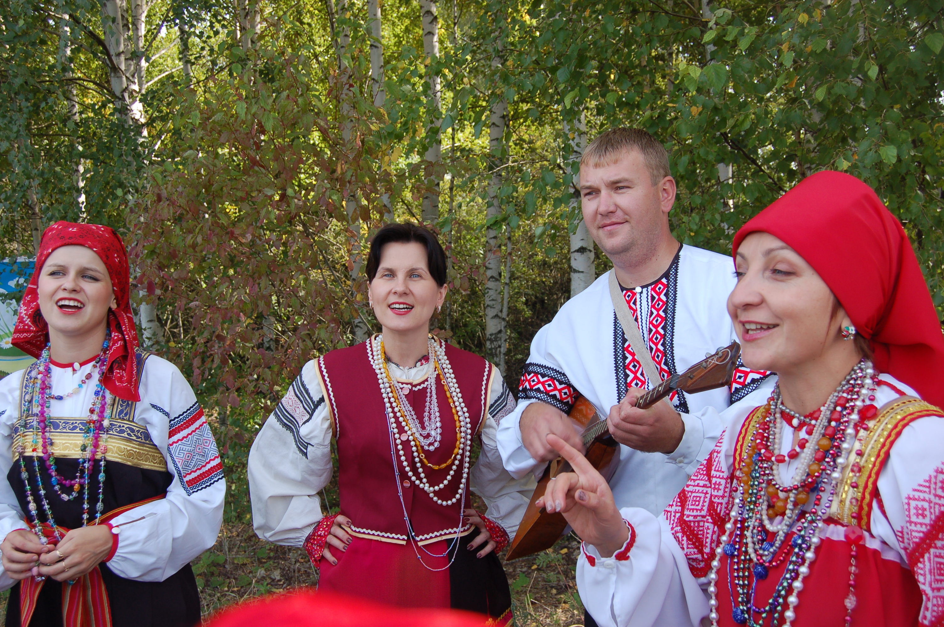 Ансамбль «Пересек». Открытие нового микрорайона родового экокопоселения «Кореньские родники». 15 сентября 2012 г. Белгородская область, Шебекинский район.